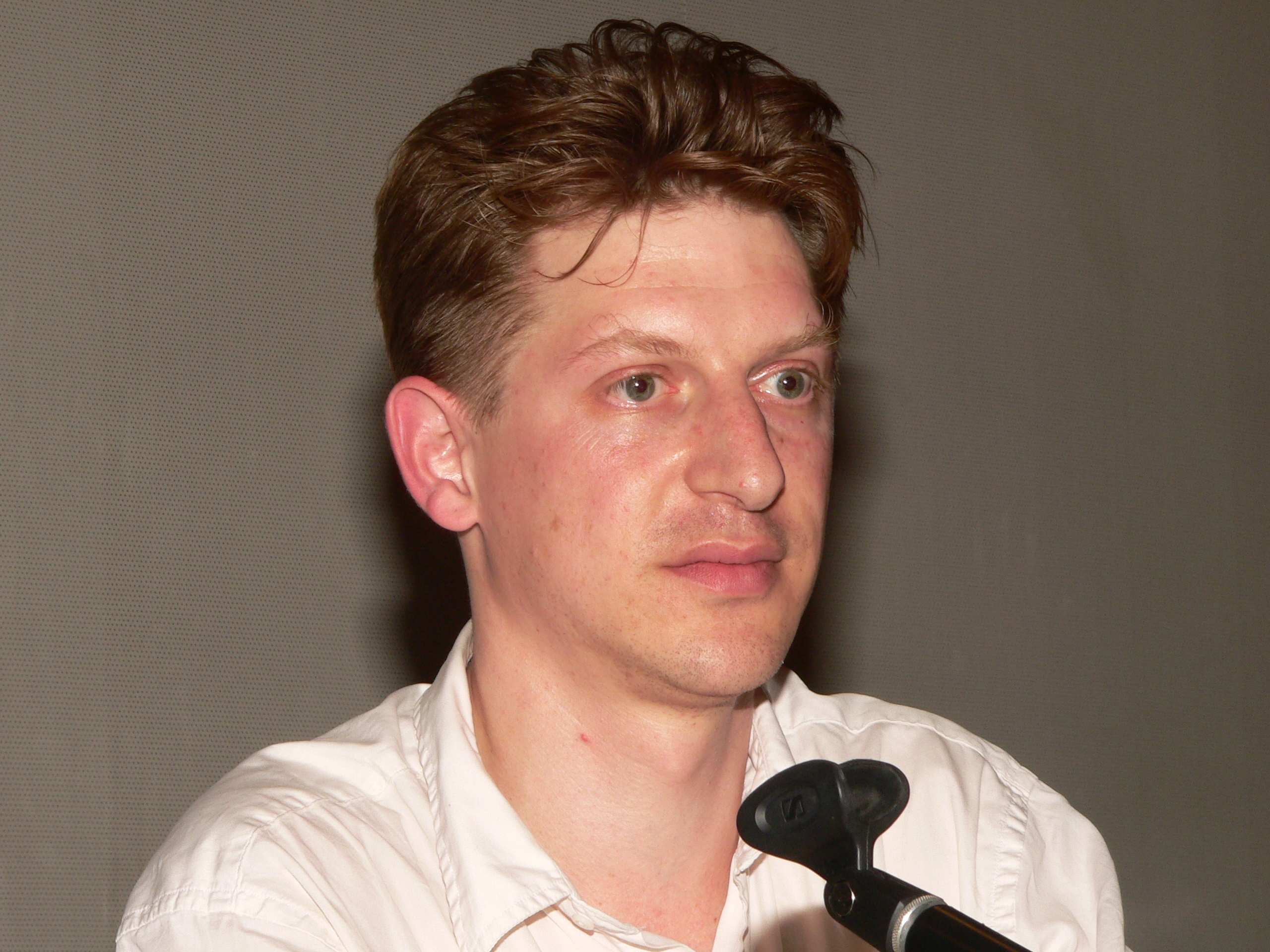 Jonathan Littell at the École normale supérieure in Paris